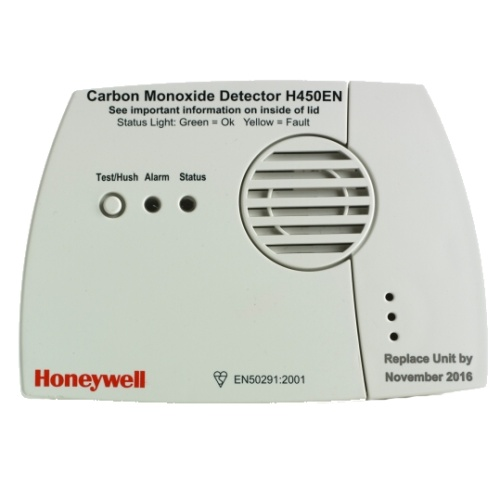 Detector CO